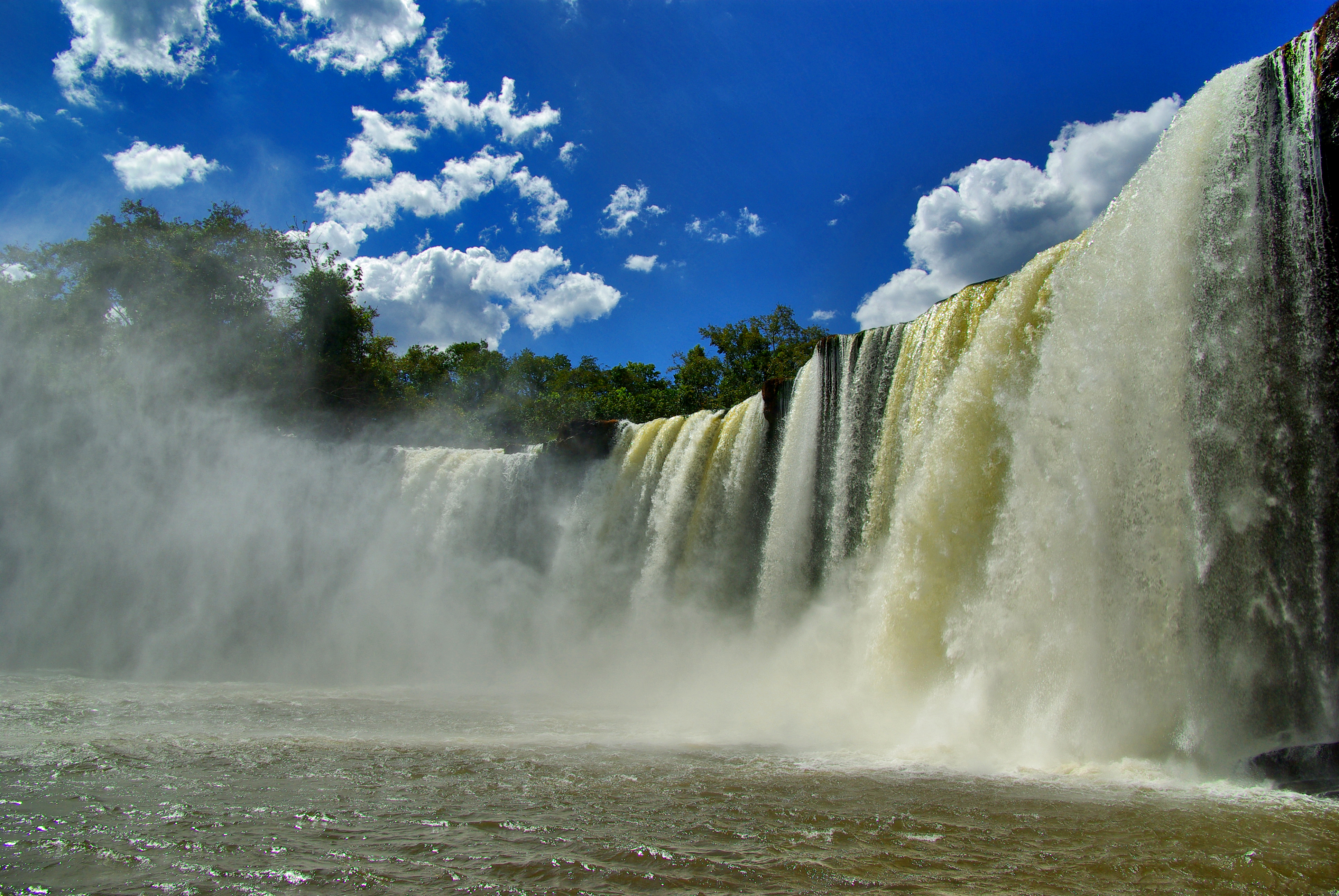 Cachoeira de São Romão, Carolina, Maranhão, Brasil.